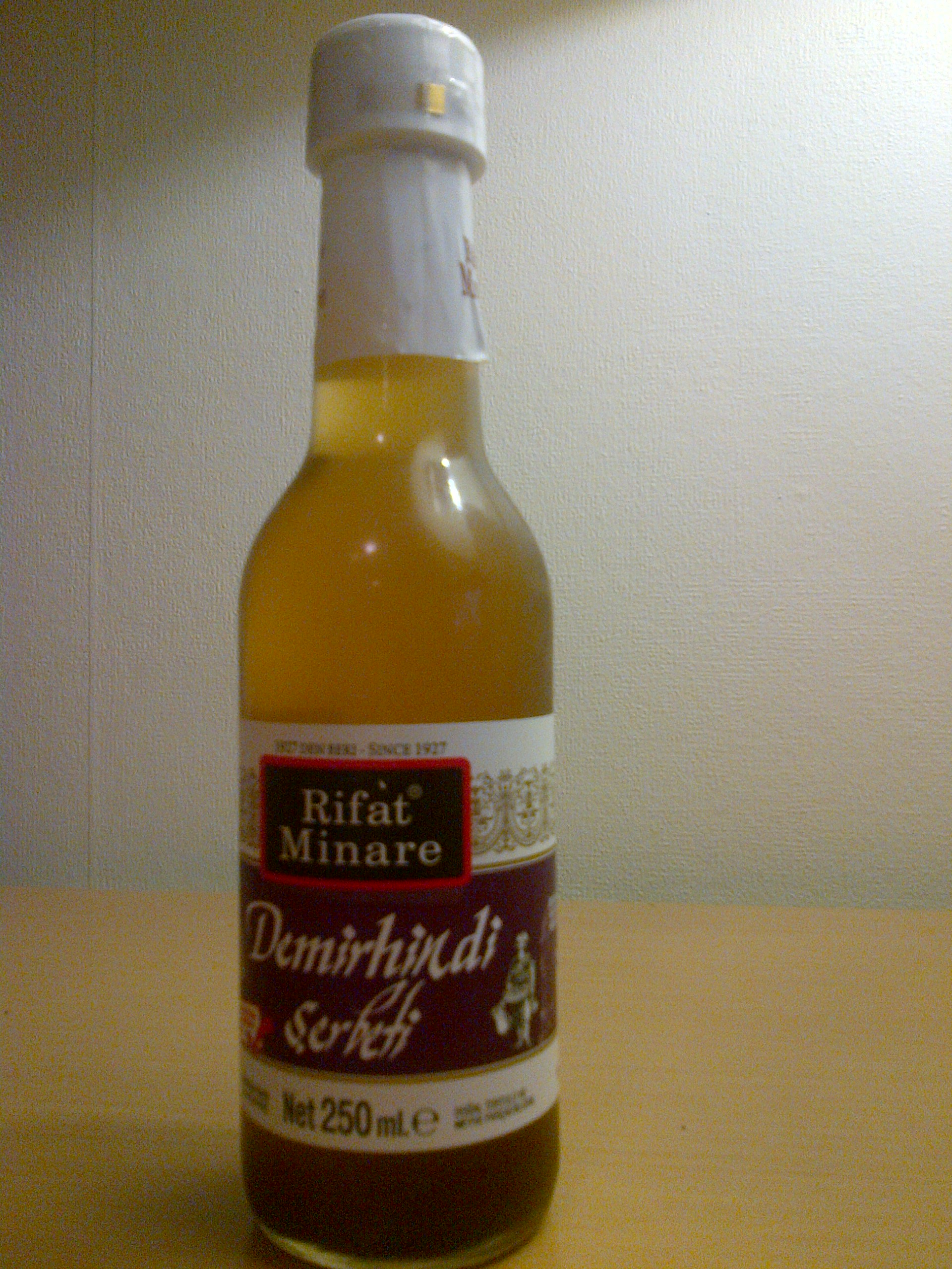 Demirhindi şerbeti es un sharbat tradicional en la cocina turca.